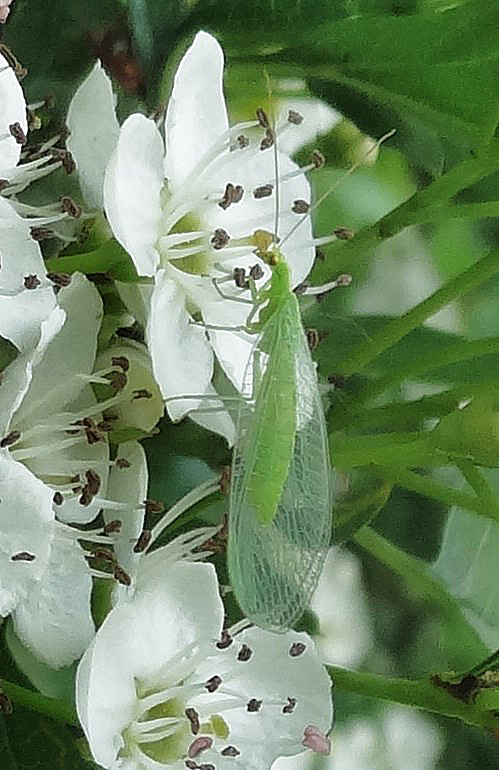 Gemeine Florfliege (Chrysoperla carnea) auf Weißdornblüte